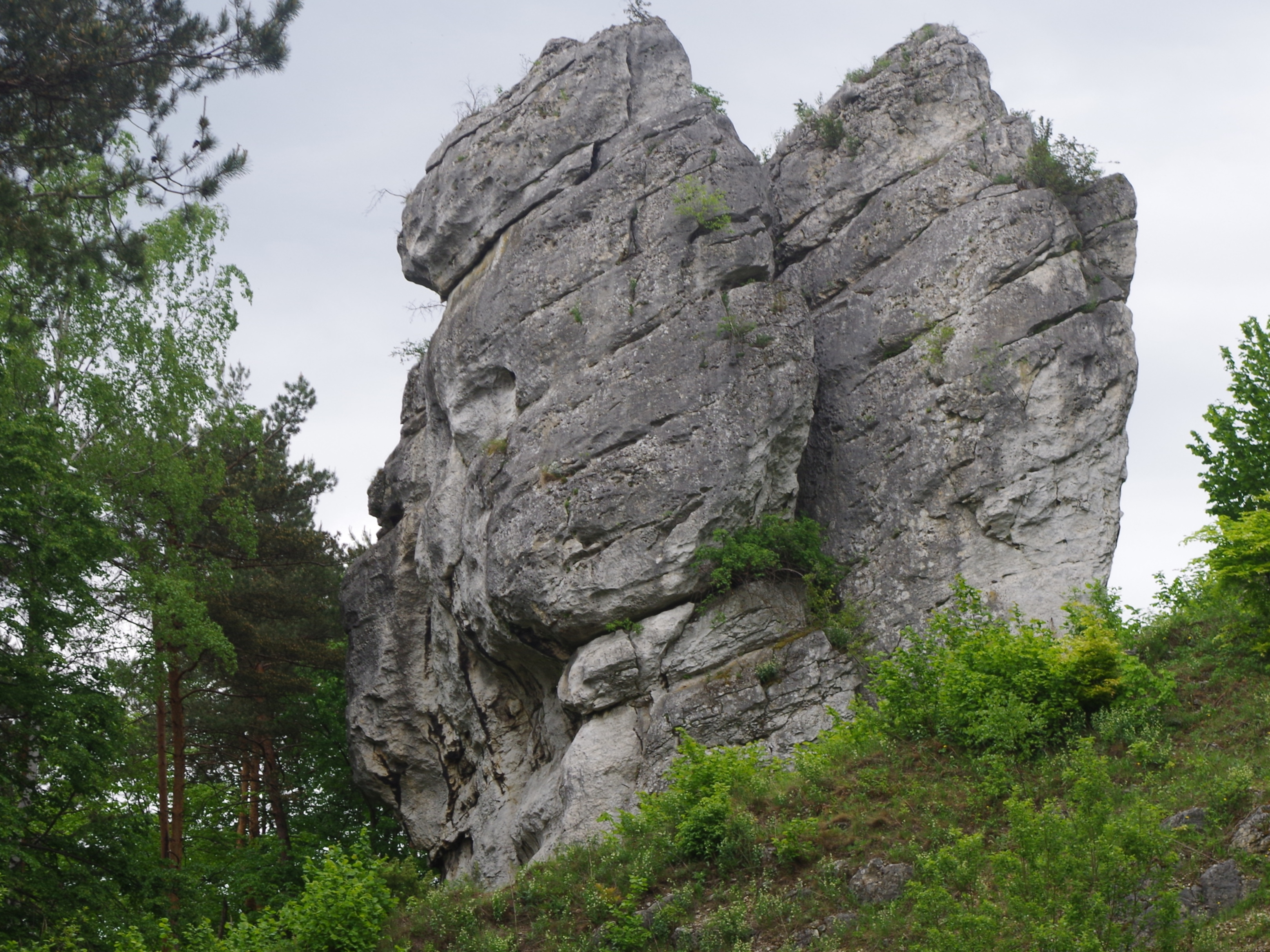 Dwoista Baszta w Podlesicach